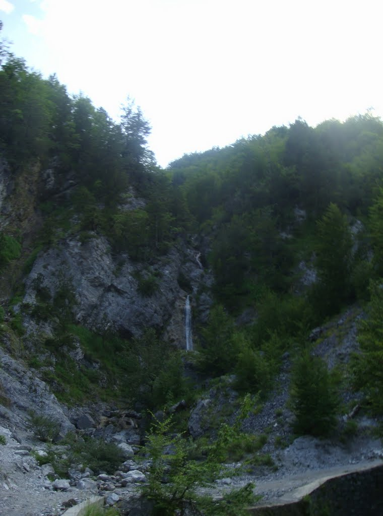 Ujvar (Posht ish Kampit)